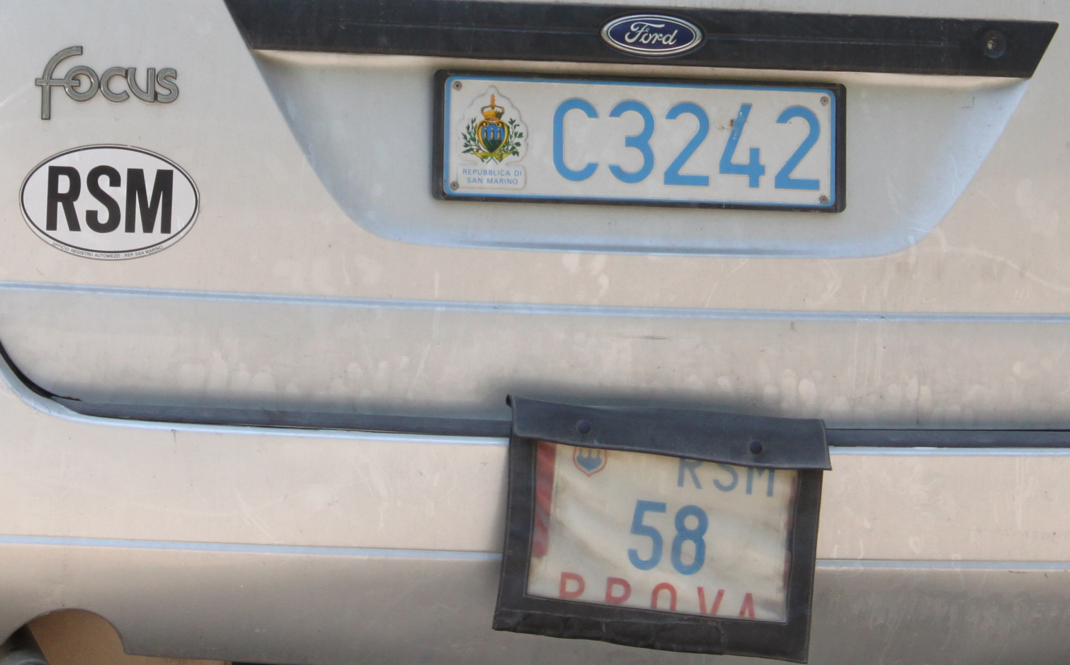 Probekennzeichen auf einem Kfz mit normalem Kz. aus San Marino